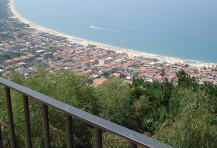 Foto di G.D'Aloi, agosto 2006